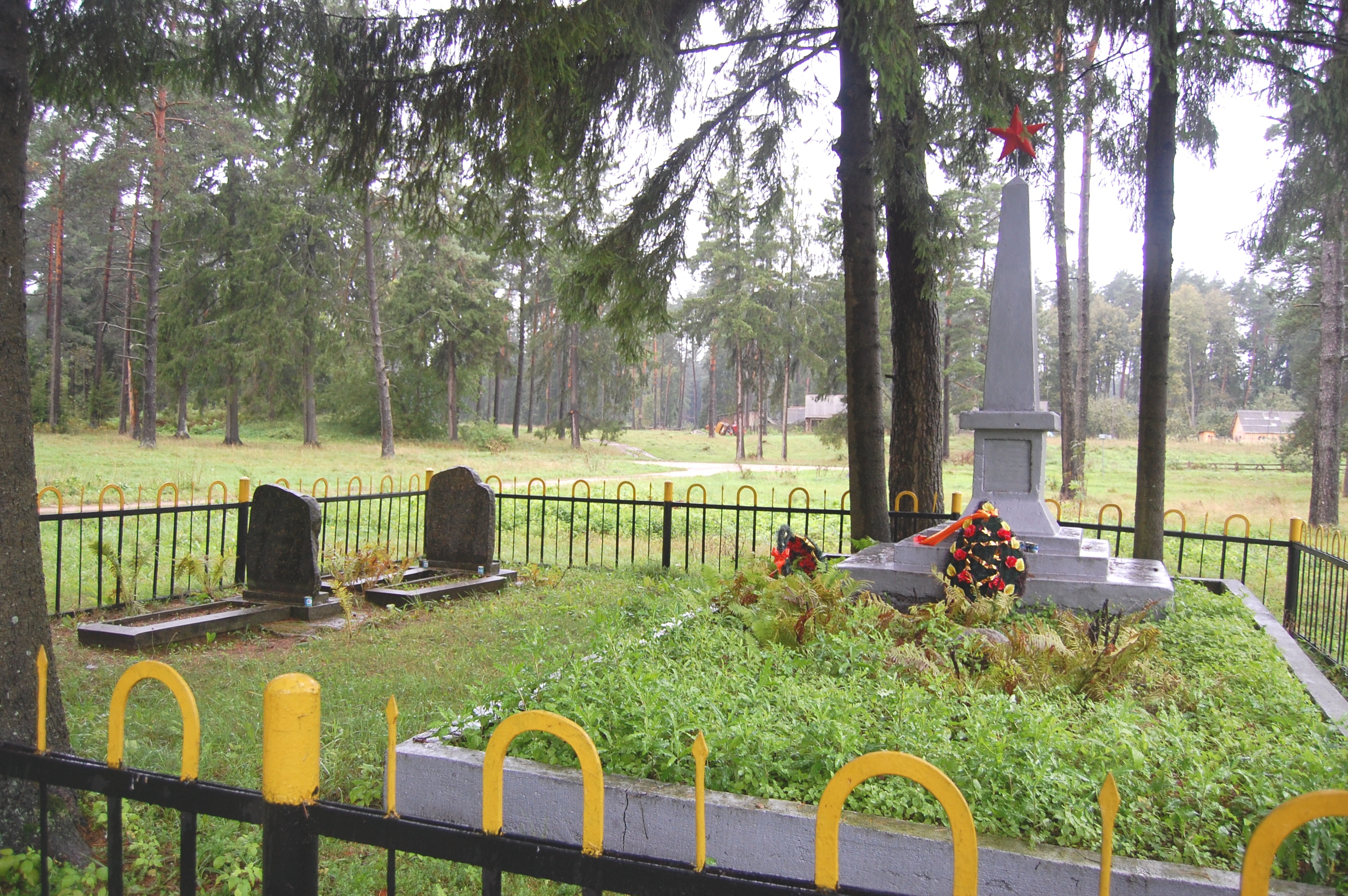 Памятник убитым евреям — узникам гетто в Лынтупах.